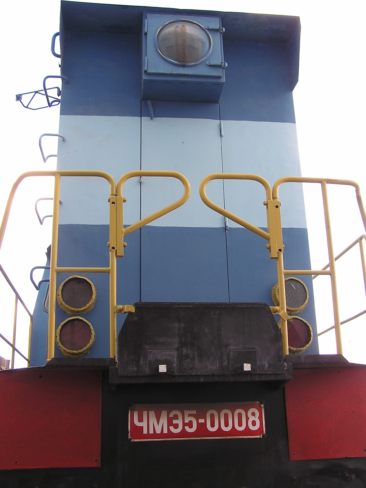 Киевский район Донецка.